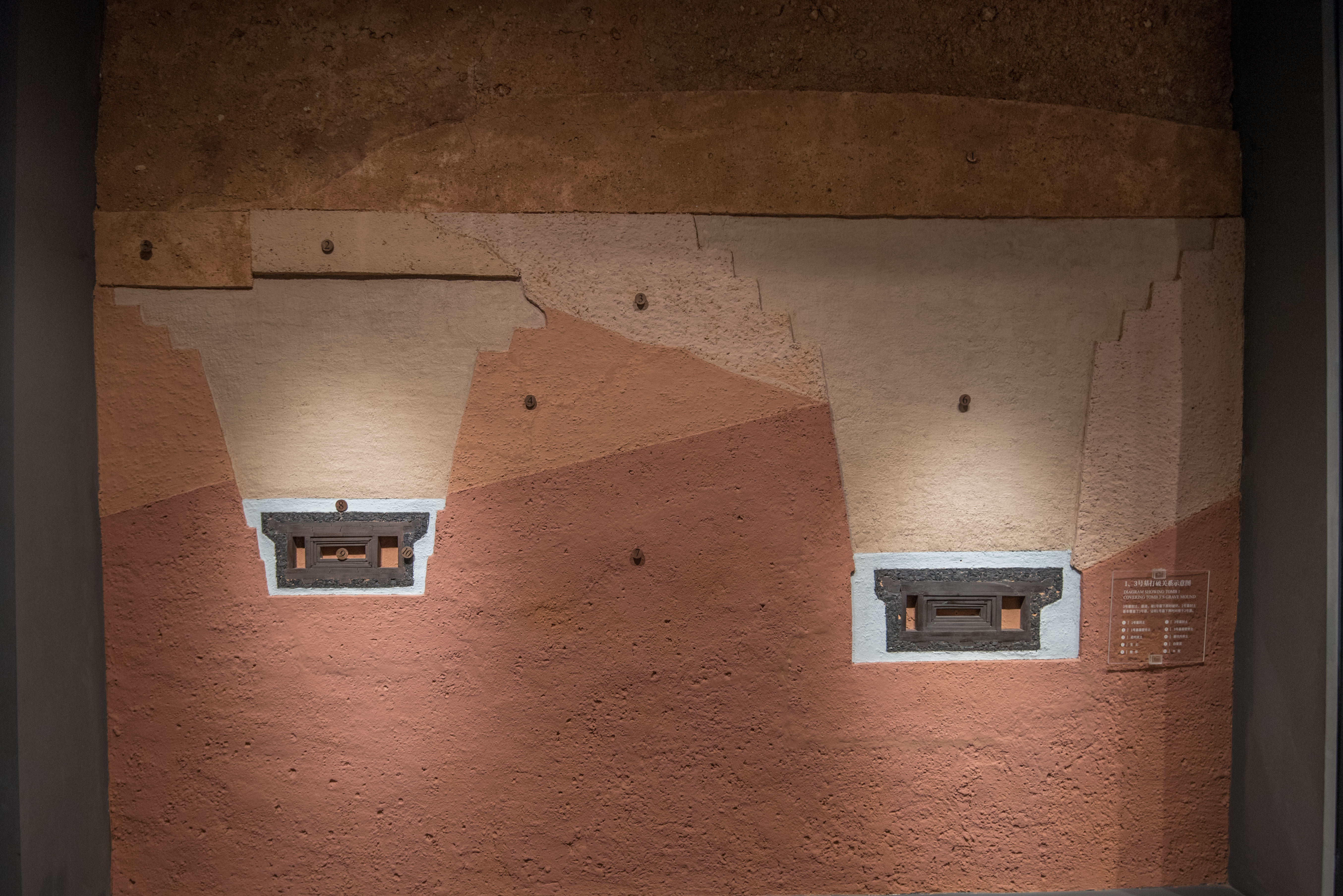 马王堆1号墓和3号墓叠压打破关系